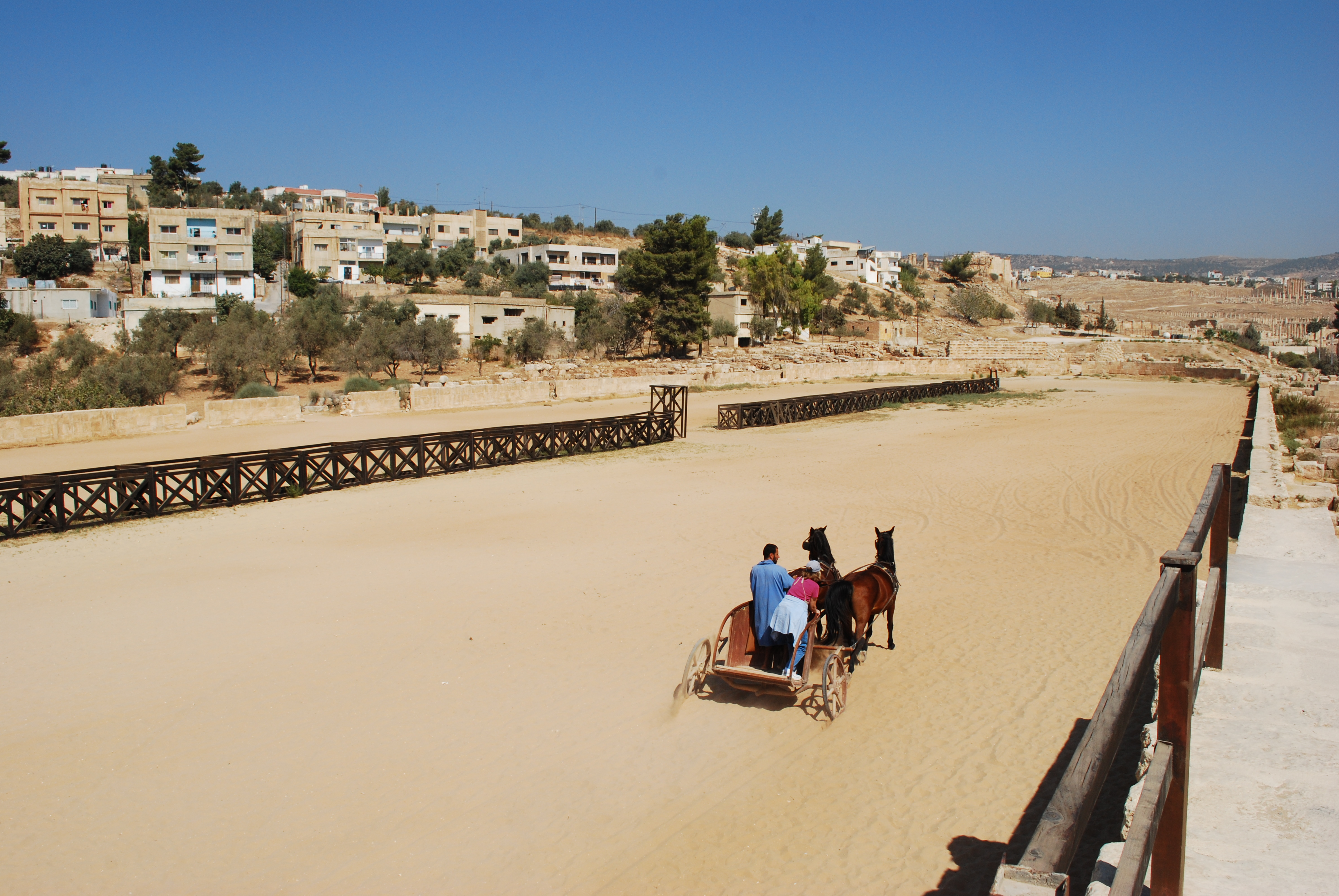 Hippodrome de Jerash.